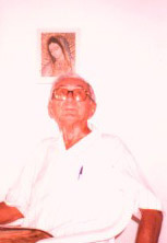 Antonio Fragoso, Vescovo emerito di Crateus